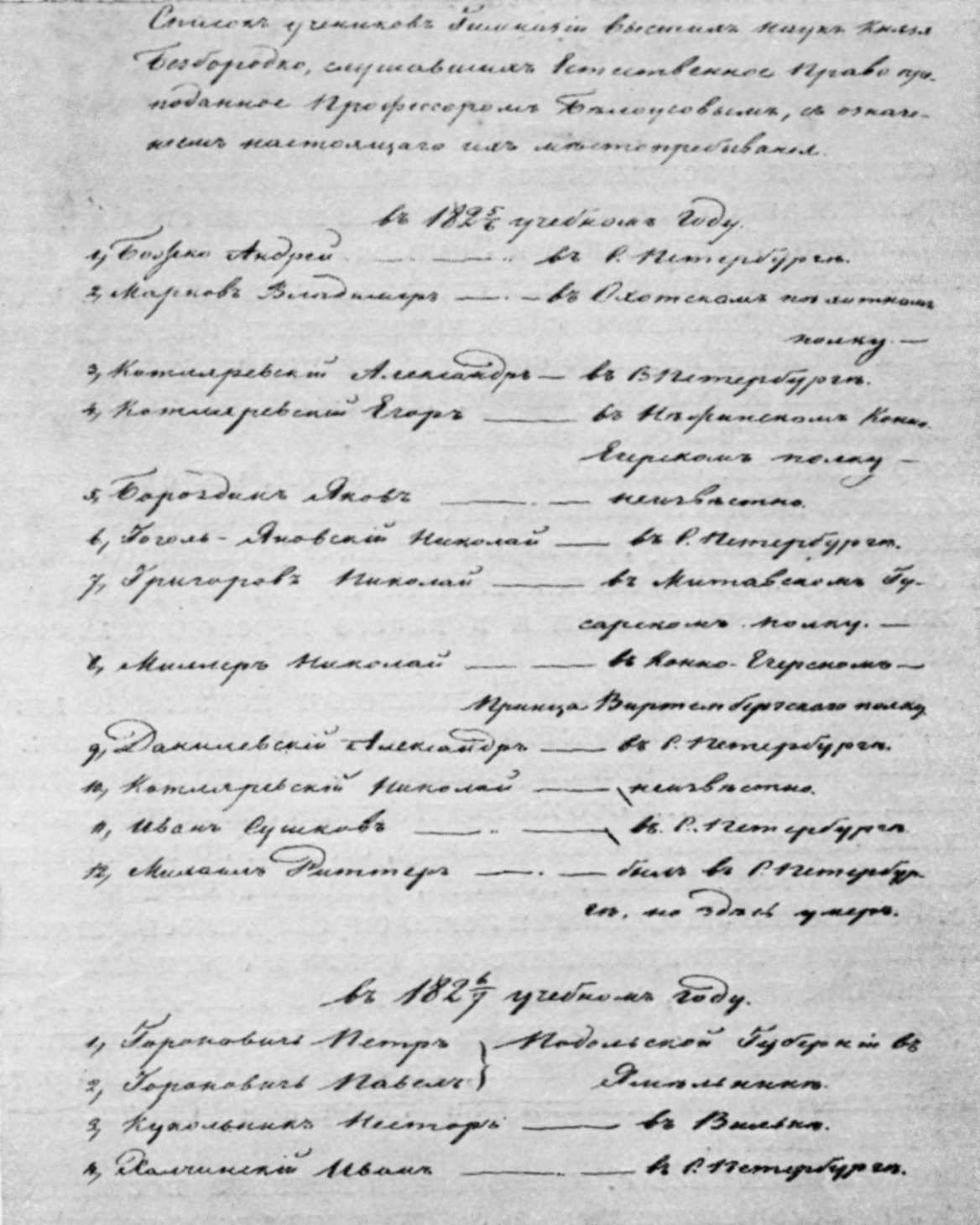 Списки выпускников1828 и 1829 гг Нежинской гимназии при исследовании вольнодумства в гимназии в 1829—1832 гг.